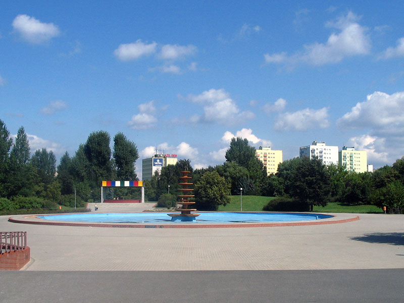 Park na Wyspie w Pile